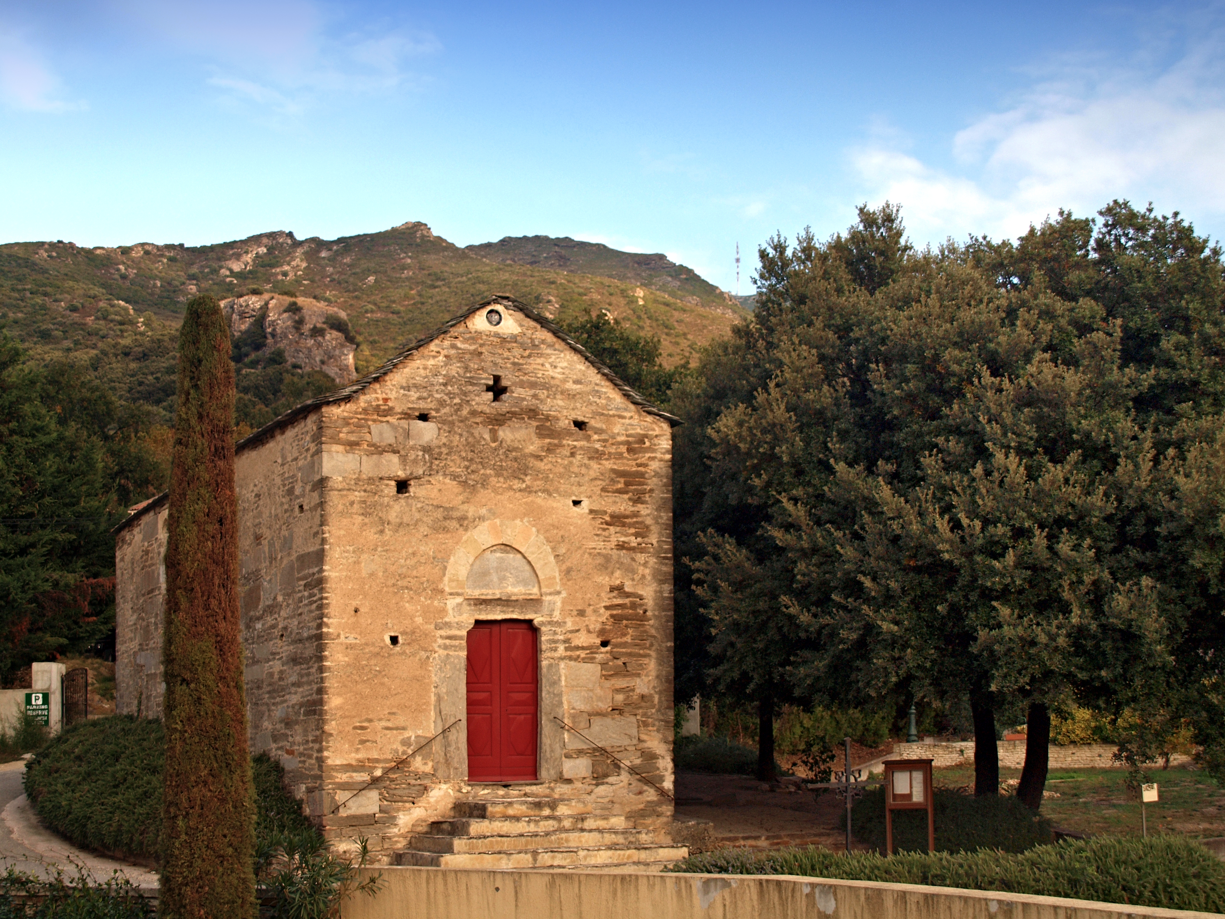 Patrimonio, Nebbio (Corse) - Chapelle romane Santa-Maria Assunta au chœur du village